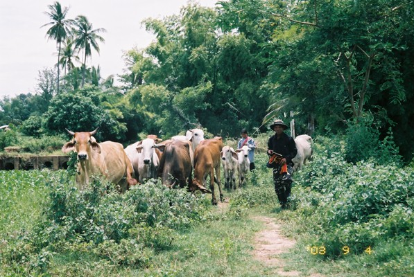 Local commons in Chaiyaphum, Thailand, offers a free common grass to villagers. This picture was taken by TORIKAI Yukihiro, a Japanese economist, in 2003/09/04. ローカル･コモンズとしての牧草の利用：タイ東北地方では，農地の間を通る畦道の両側に草が茂っているが，それを牛に食ませている。しかし，農地に牛が侵入して，農作物を荒らすことがないように，牛追いは配慮している。つまり，ローカル・コモンズを無償で利用してはいるが,収奪的な利用とならないように，配慮している。2003年9月タイ東北地方チャイヤプーン県で鳥飼行博撮影。